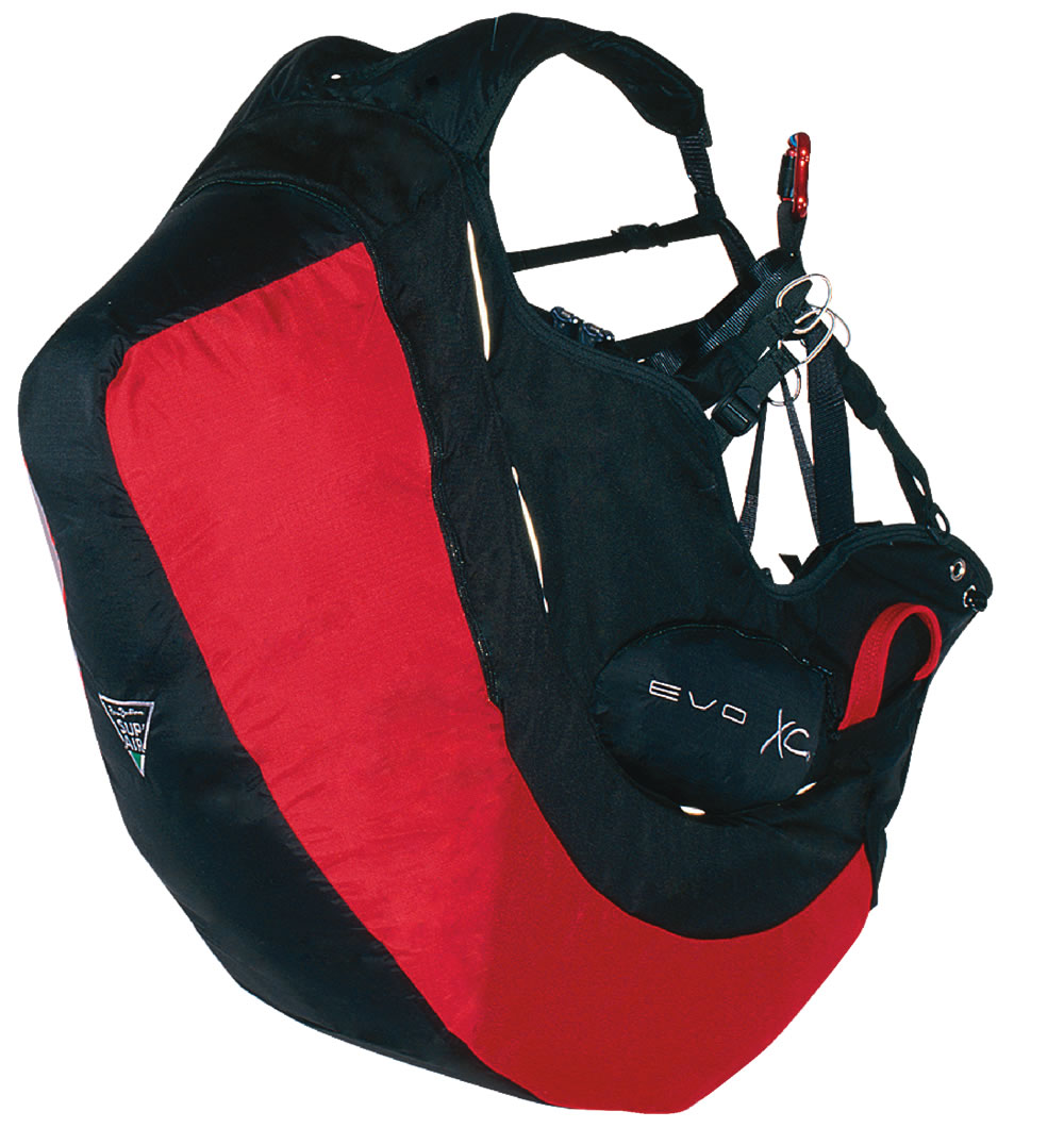 voir Utilisateur:FredB/Autorisation photos SUP'AIR